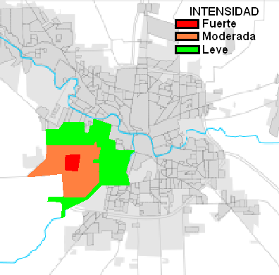 Sectores afectados directa e indirectamente por el tornado de Córdoba del 26 de Diciembre de 2003